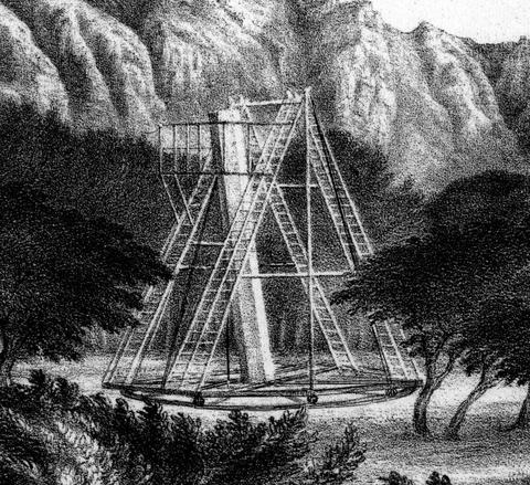 John Herschels Teleskop bei Feldhausen am Kap der Guten Hoffnung 1834 in Suedafrika. Scan vom Original, um 1847, Gemeinfrei durch Alter.